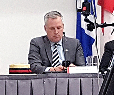 Séance du Conseil d'arrondissement de Ville-Marie du 13 septembre 2016. Steve Shanahan, conseiller de la Ville, district de Peter-McGill ; Ville-Marie borough council meeting, 13 September 2016. Steve Shanahan, city councillor for Peter-McGill district; Montréal, Québec, Canada, 13 September 2016.